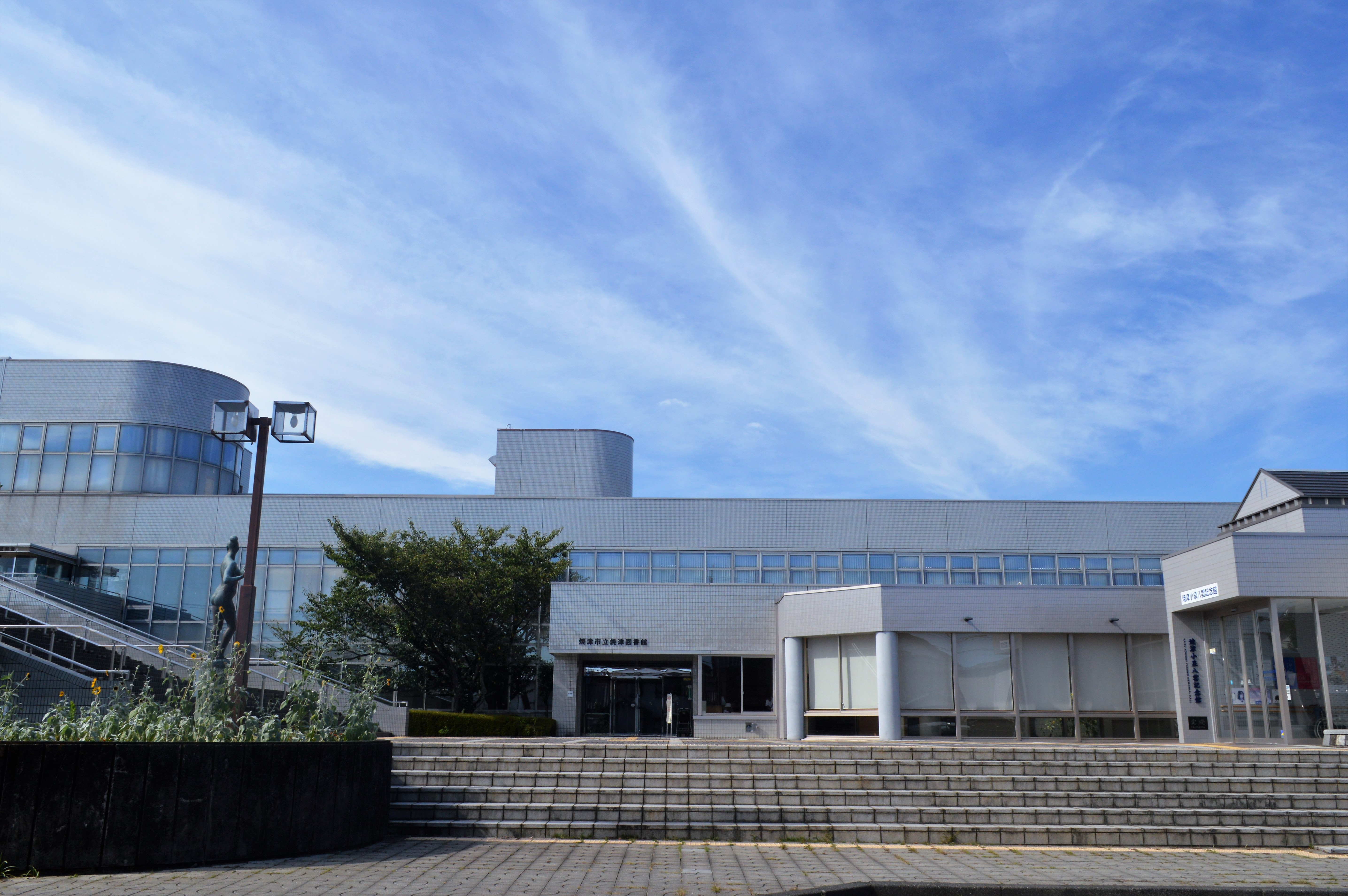 静岡県の焼津市立焼津図書館。焼津市立図書館の中央館。